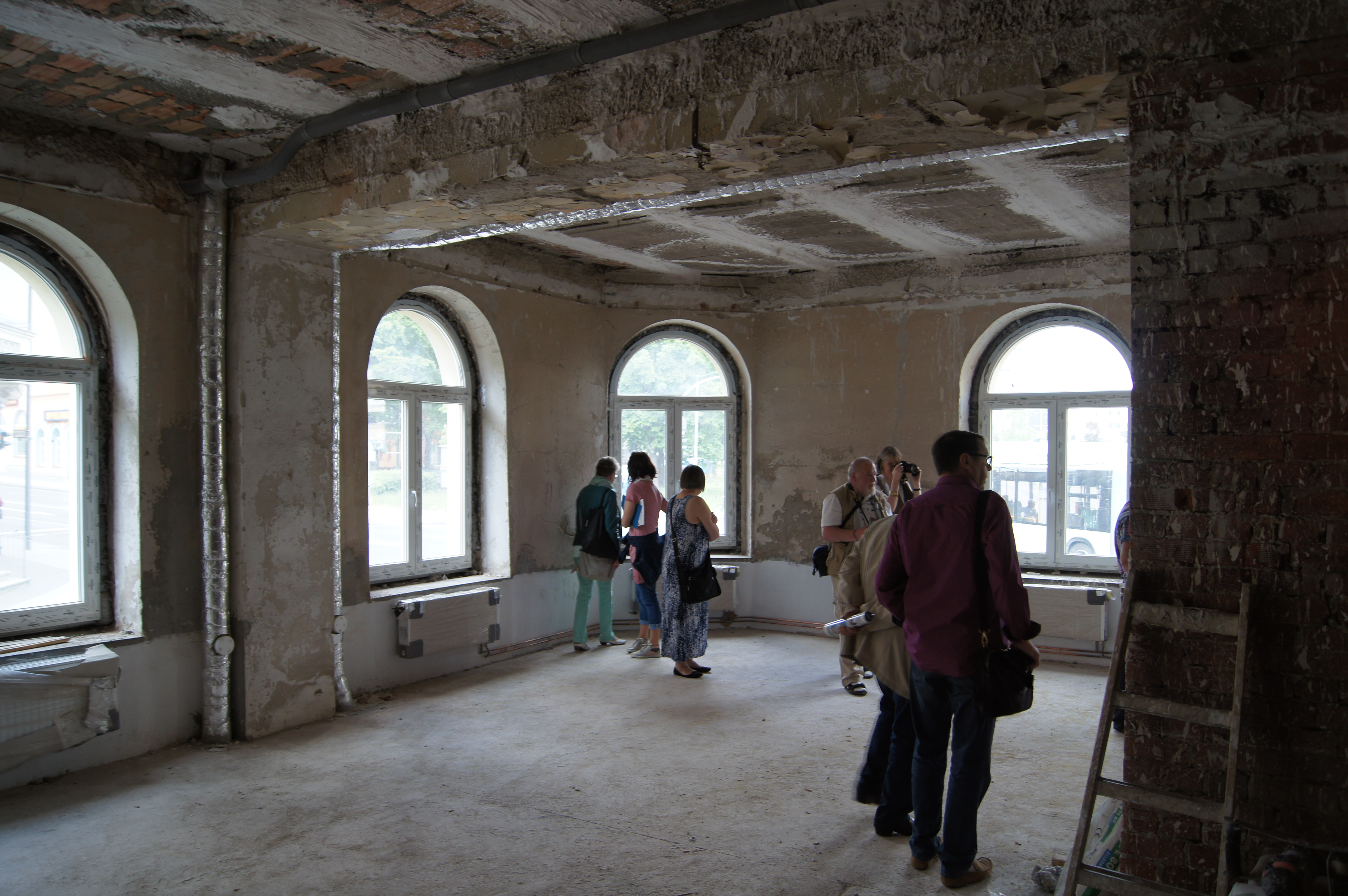 Innenansicht während der Bauarbeiten Hotel Polonia in Frankfurt (Oder), Deutschland